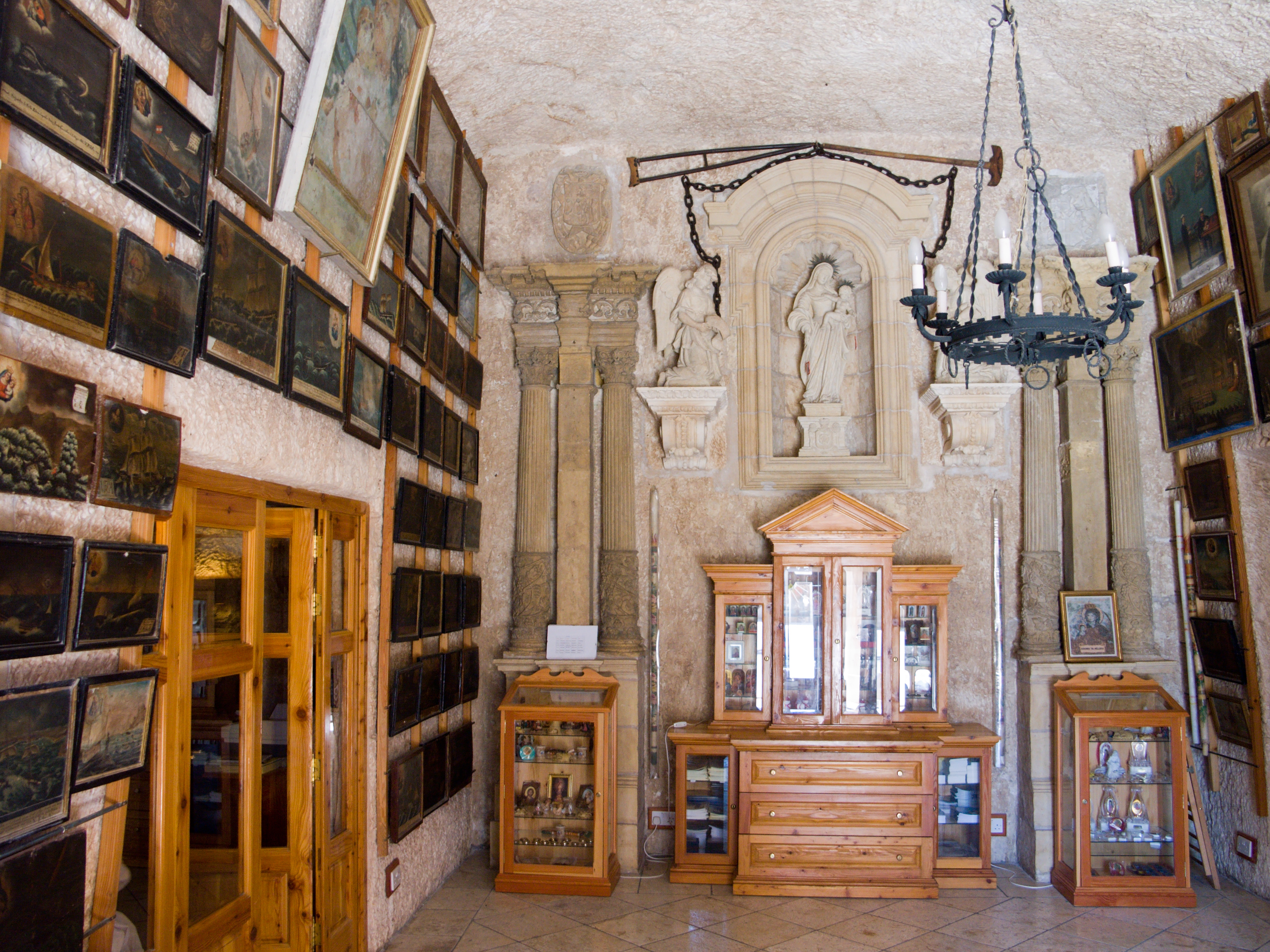 Sanctuaire de Notre Dame de Melheia- Malte